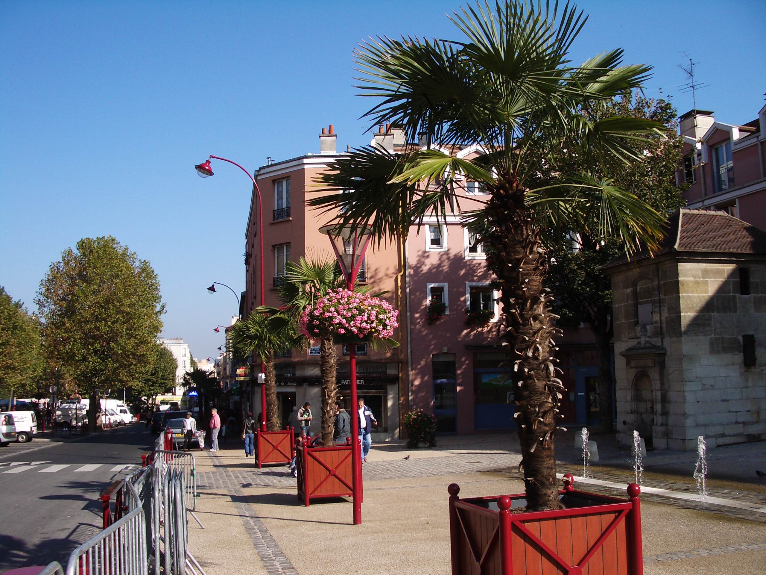 Au coeur du Pré Saint-Gervais, ville française.